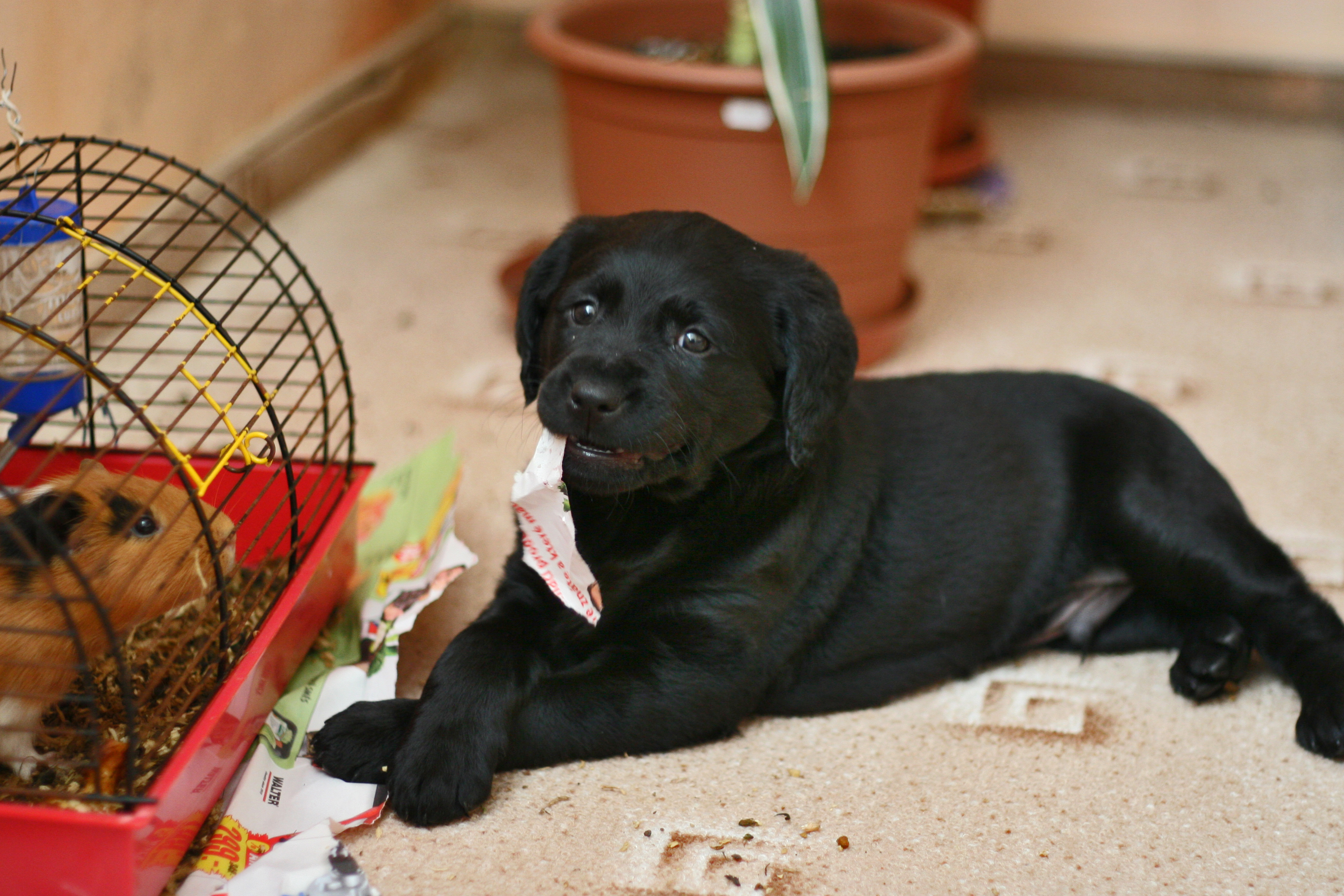 Neposedné štěně Labradorského retrívra